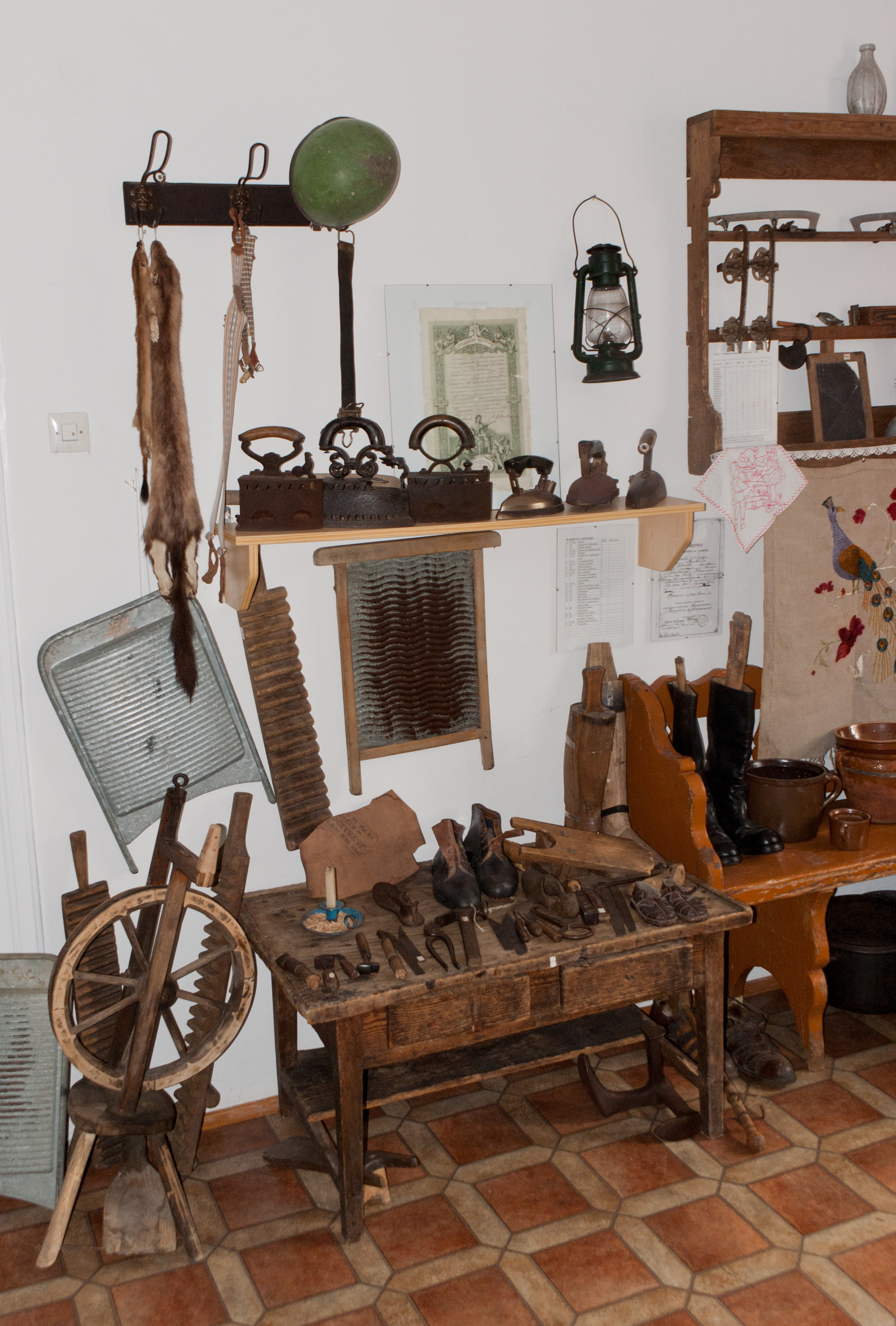 Ekspozycja Izby Regionalnej w Rymanowie.